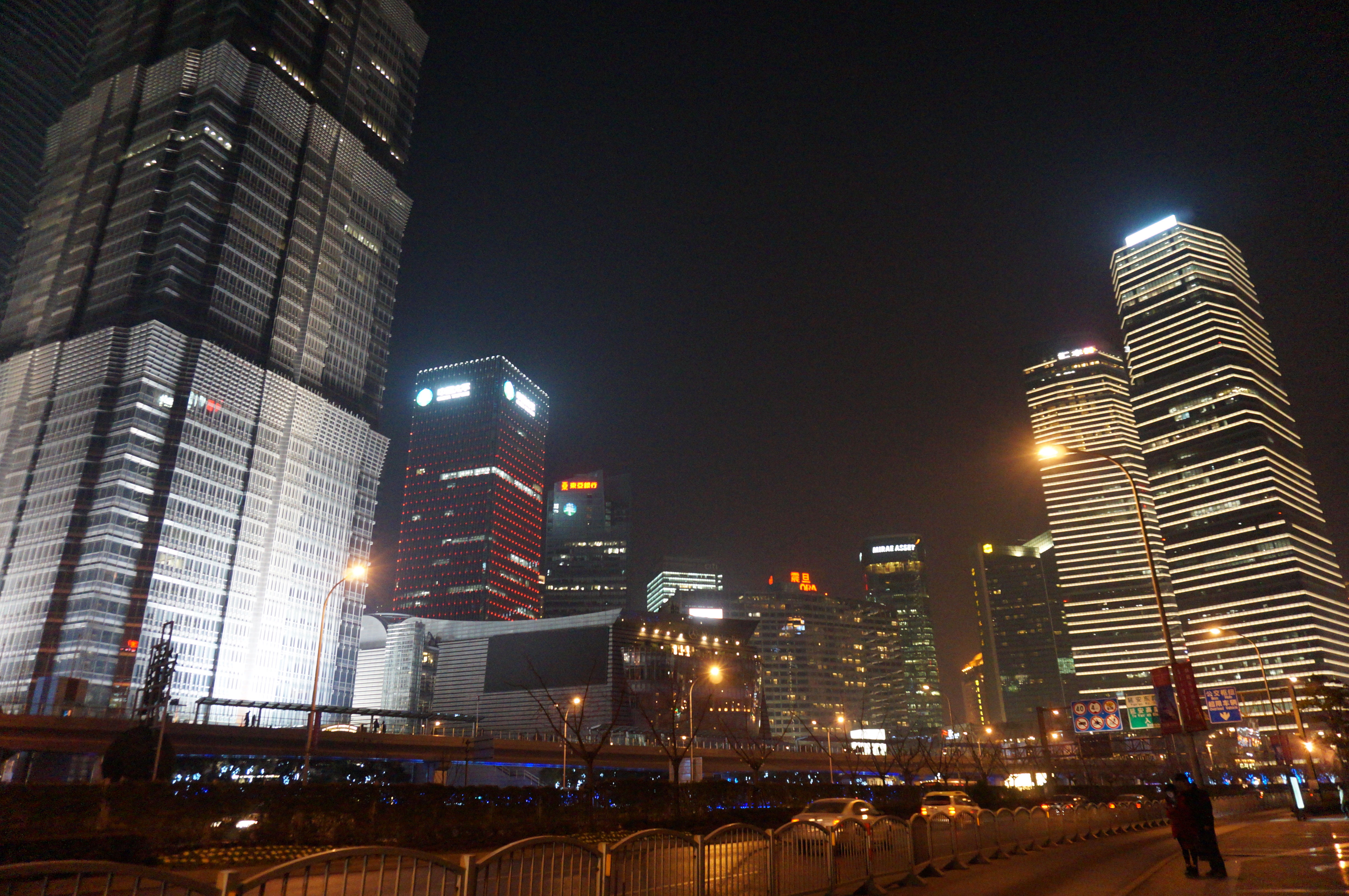 陆家嘴世纪大道夜景